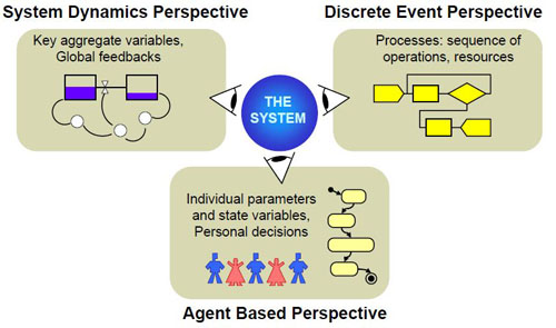 Три подхода имитационного моделирования